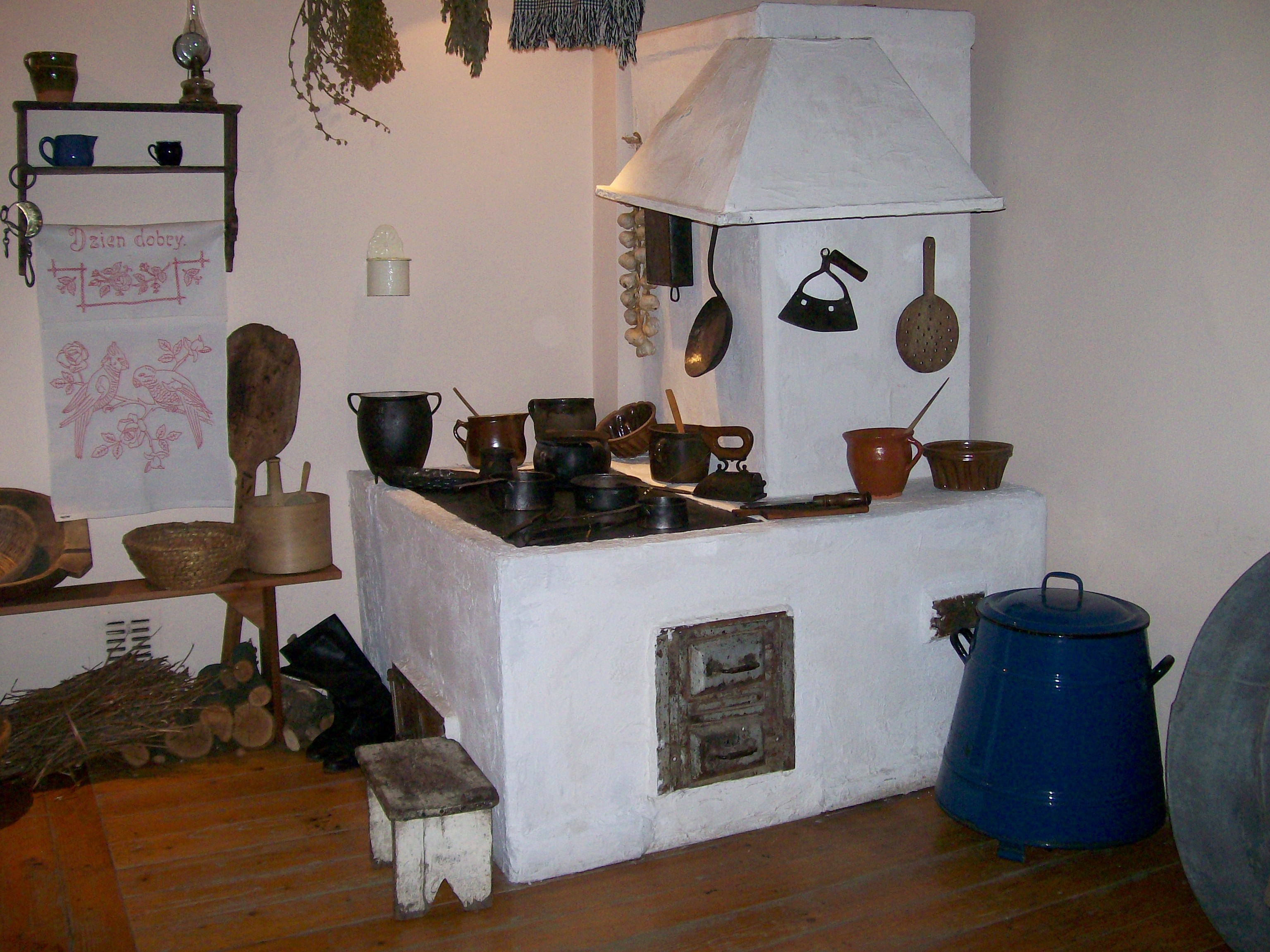 Muzeum Zagłębia w Będzinie - Wystawa: "Izba zagłębiowska"